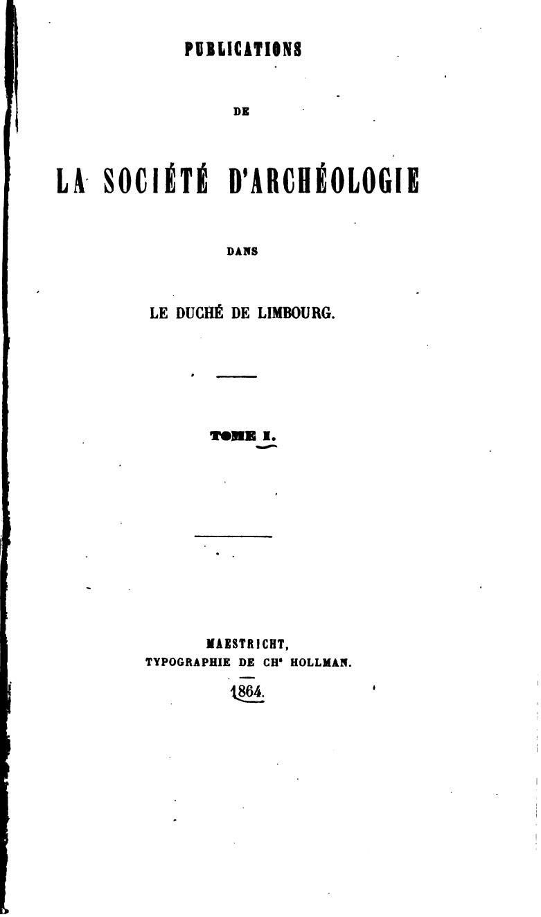 Publications de la société d'archéologie dans le duché de Limbourg, tome I, Maestricht: Typographie de Chs Hollman, 1864, p. i.